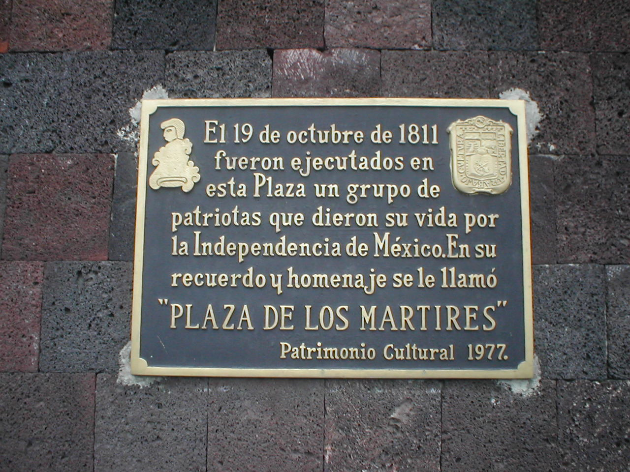 El 19 de octubre de 1811 fueron ejecutados en la Plaza un grupo de patriotas que dieron su vida por la Independencia de México. En su homenaje y recuerdo se le llamó Plaza de los Mártires. Esta es la placa explicativa.